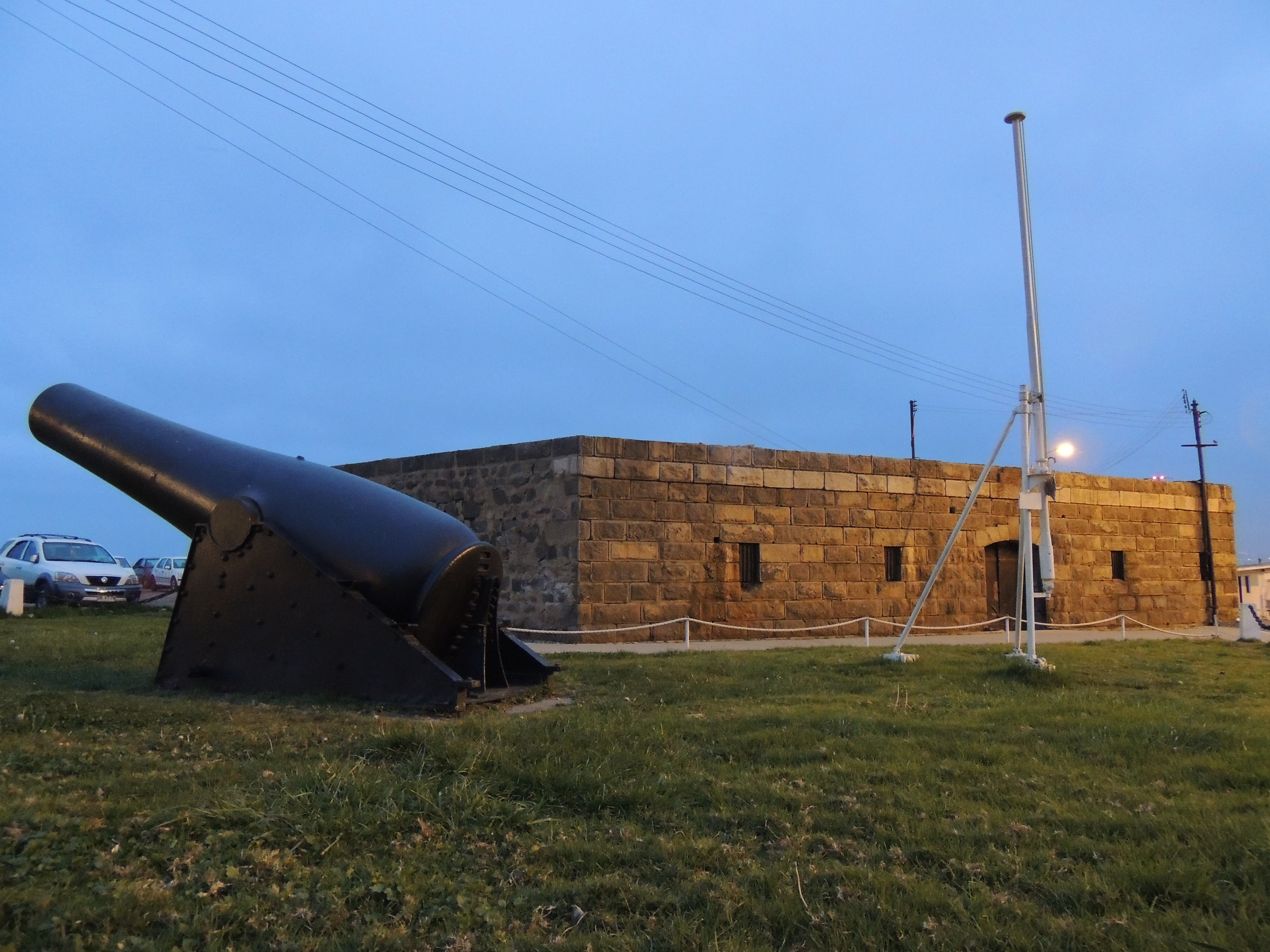 Batería Esmeralda al amanecer. Fortificación de casamata construida en 1879 para la protección del puerto de Valparaíso, Chile. This is a photo of a national monument in Chile: 759